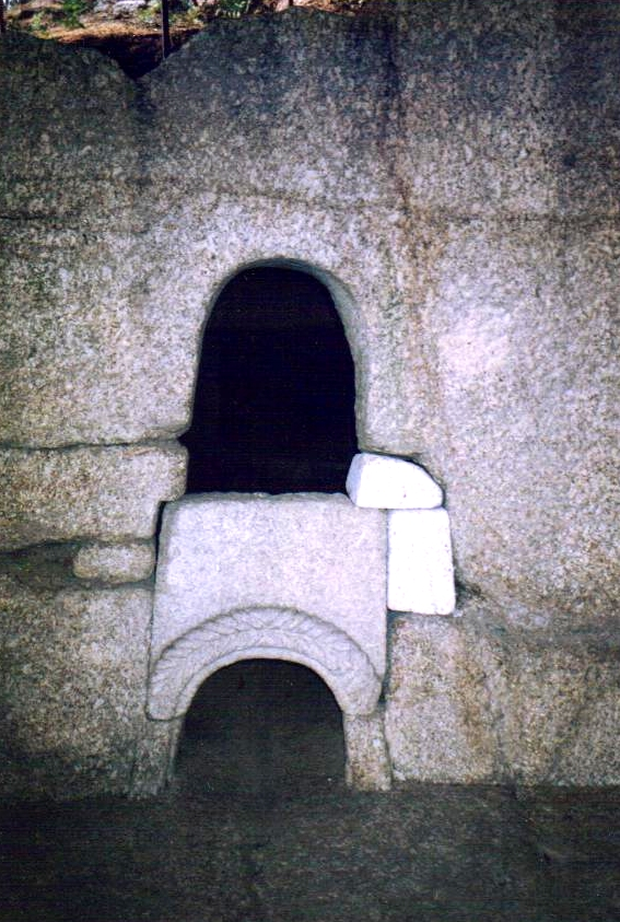 Pedra Formosa - Tongóbriga - Marco de Canaveses - Portugal